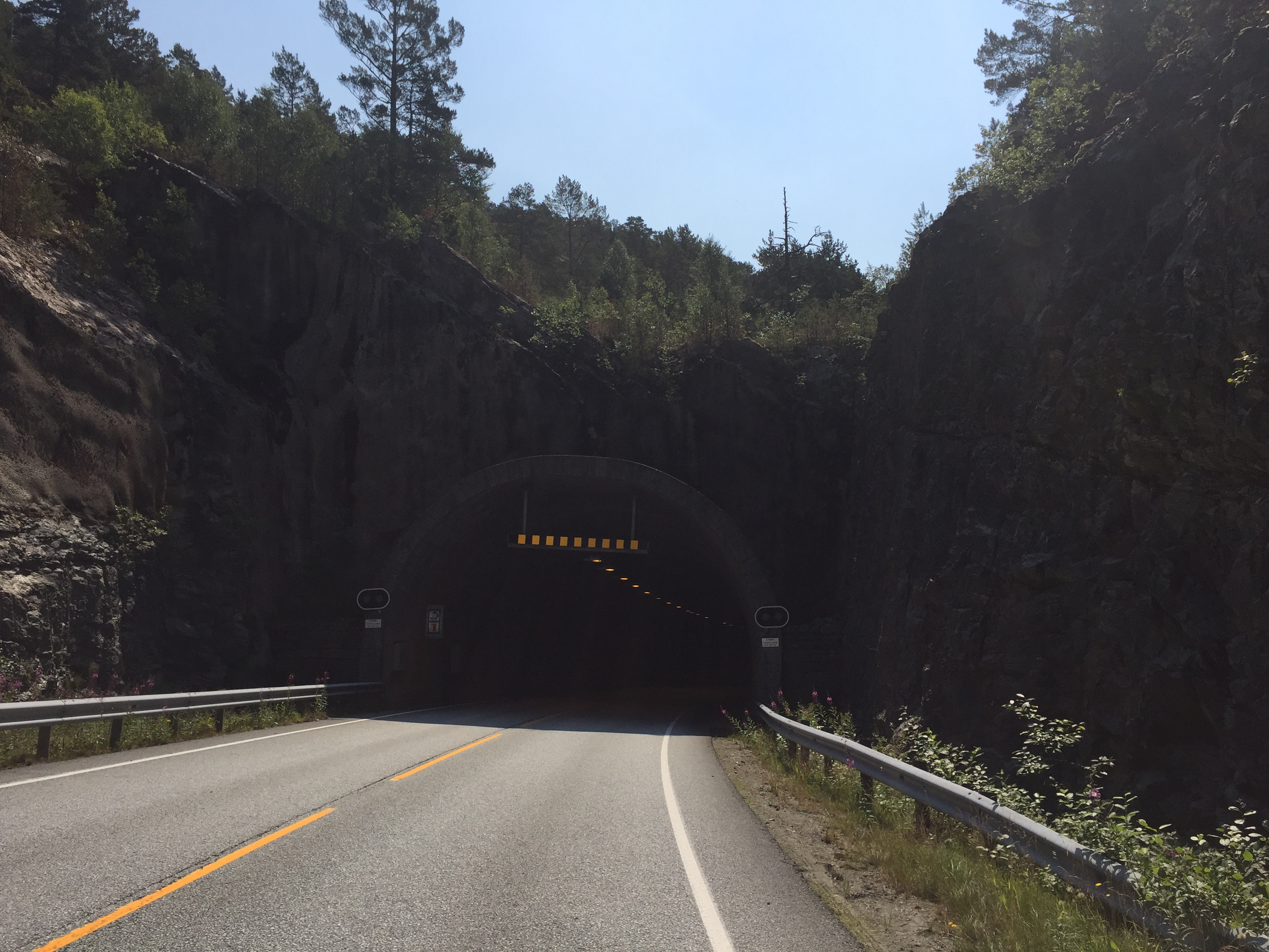 Kråkeskartunnelen